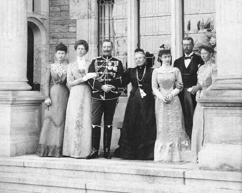 Wilhelm and his siblings, with Mother.